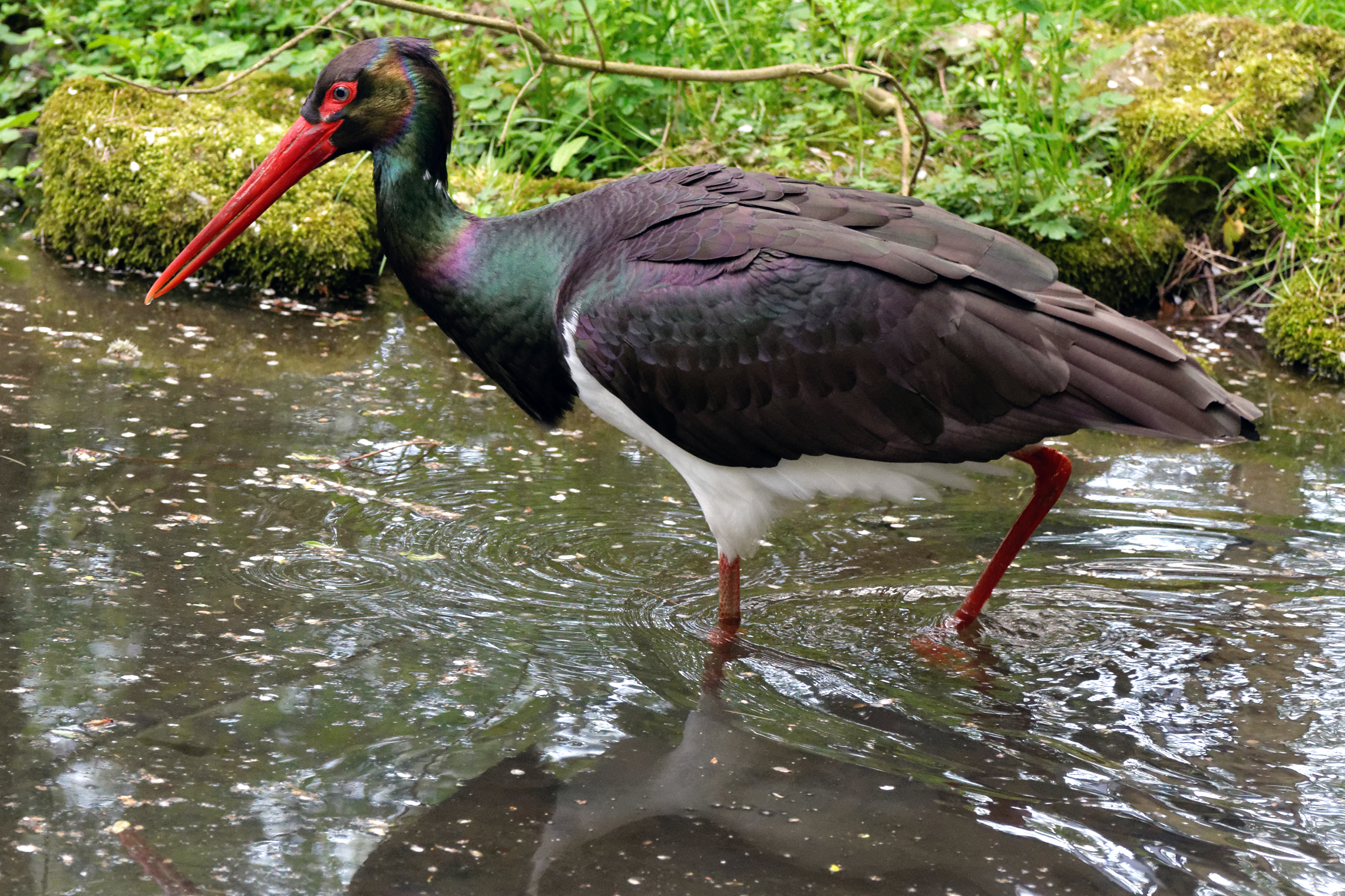 Ein guter Platz für wilde Tiere,der Wildpark in Bad Mergentheim.